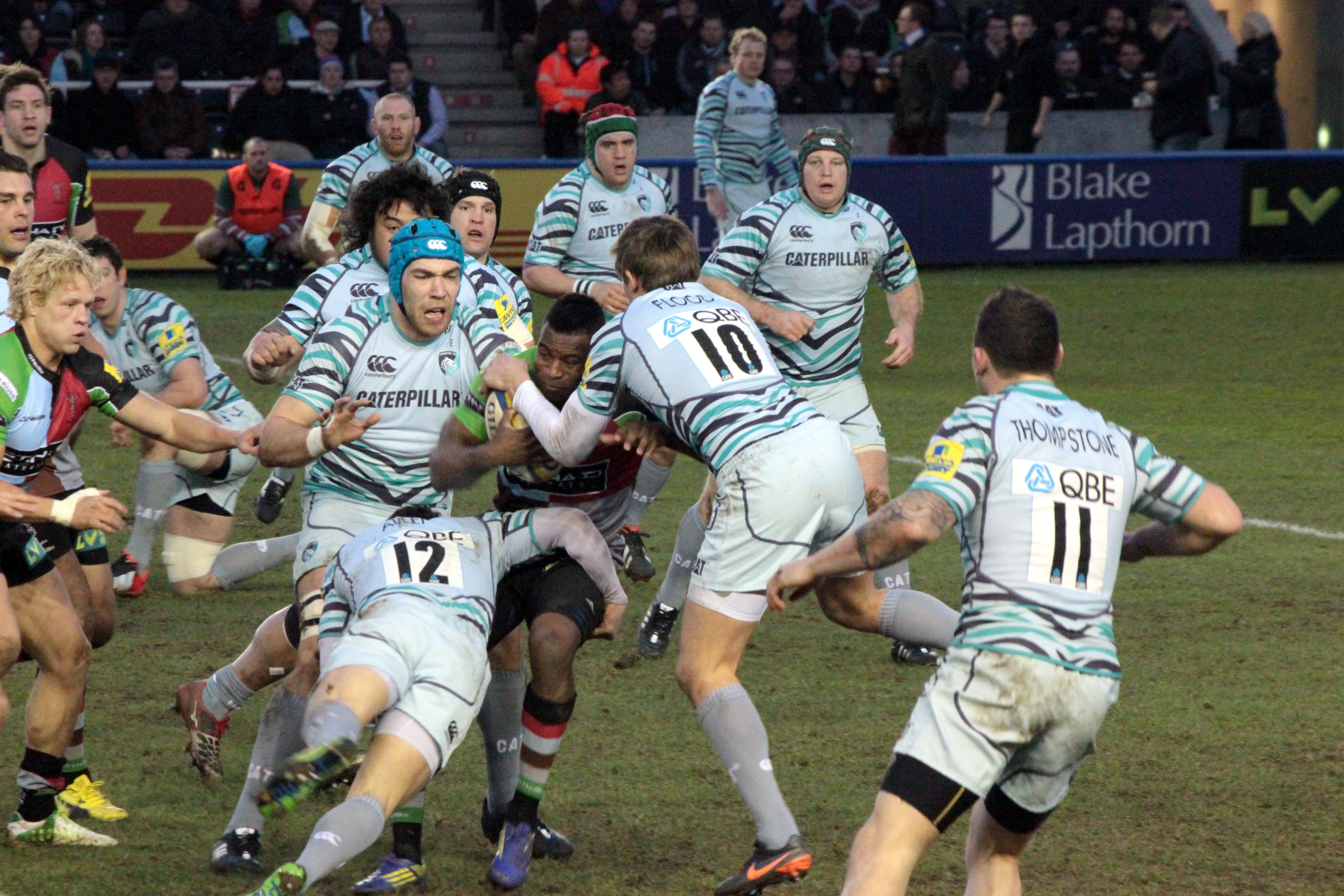 Harlequns vs Tigers 2013